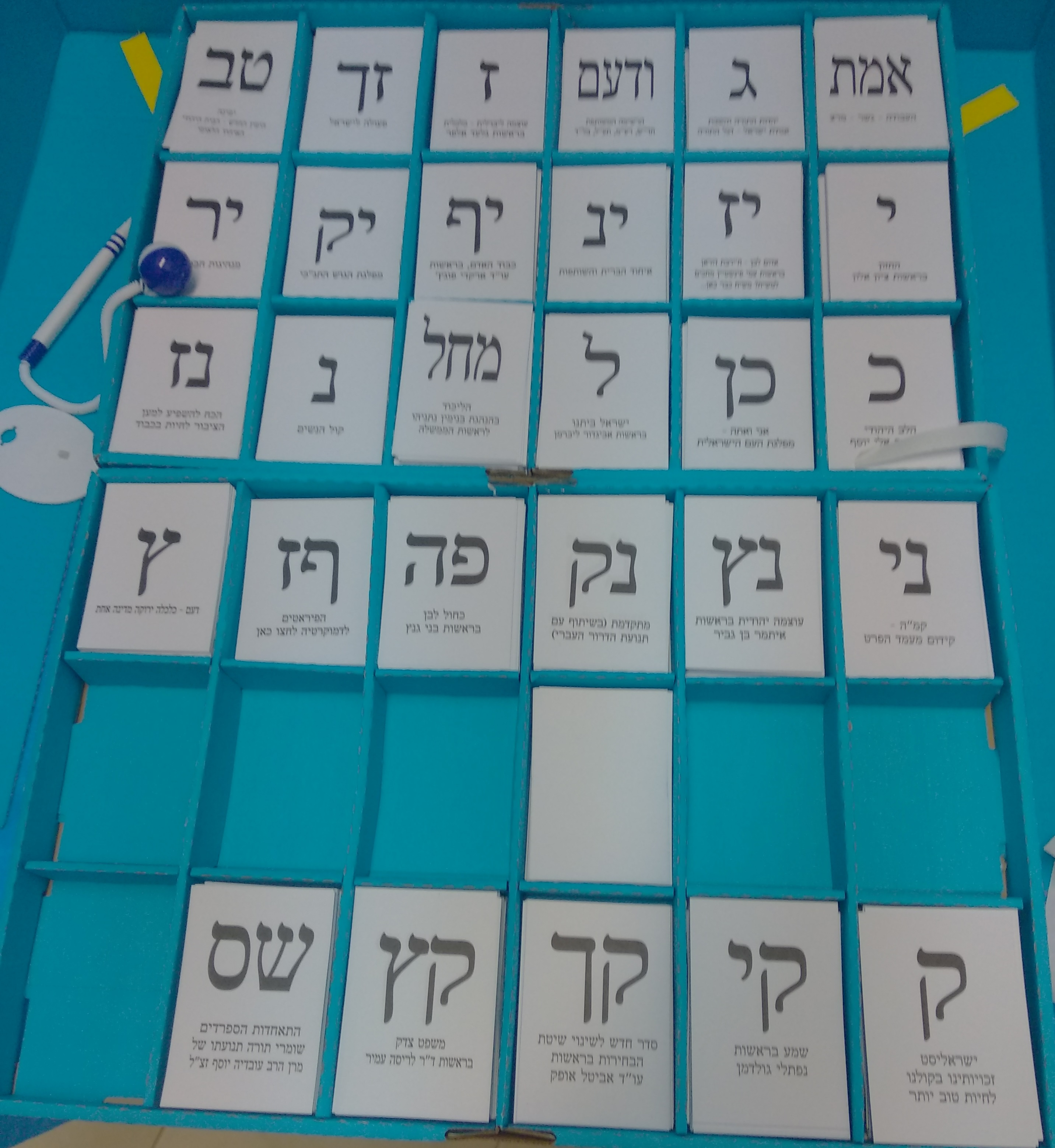 פתקי הצבעה בבחירות לכנסת העשרים ושלוש